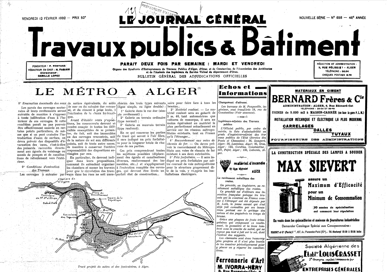 Le Métro à Alger, Une du bi-hébdomadaire, Journal Général des Travaux Publics et Batiment